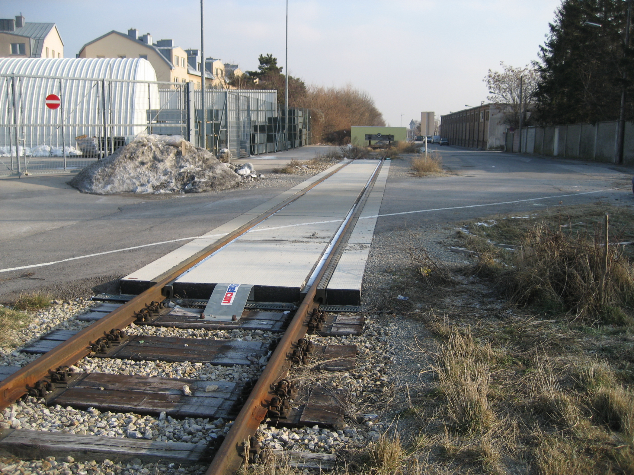 Das derzeitige Ende der ehemaligen Laxenburger Bahn im Bahnhof Mödling in Niederösterreich